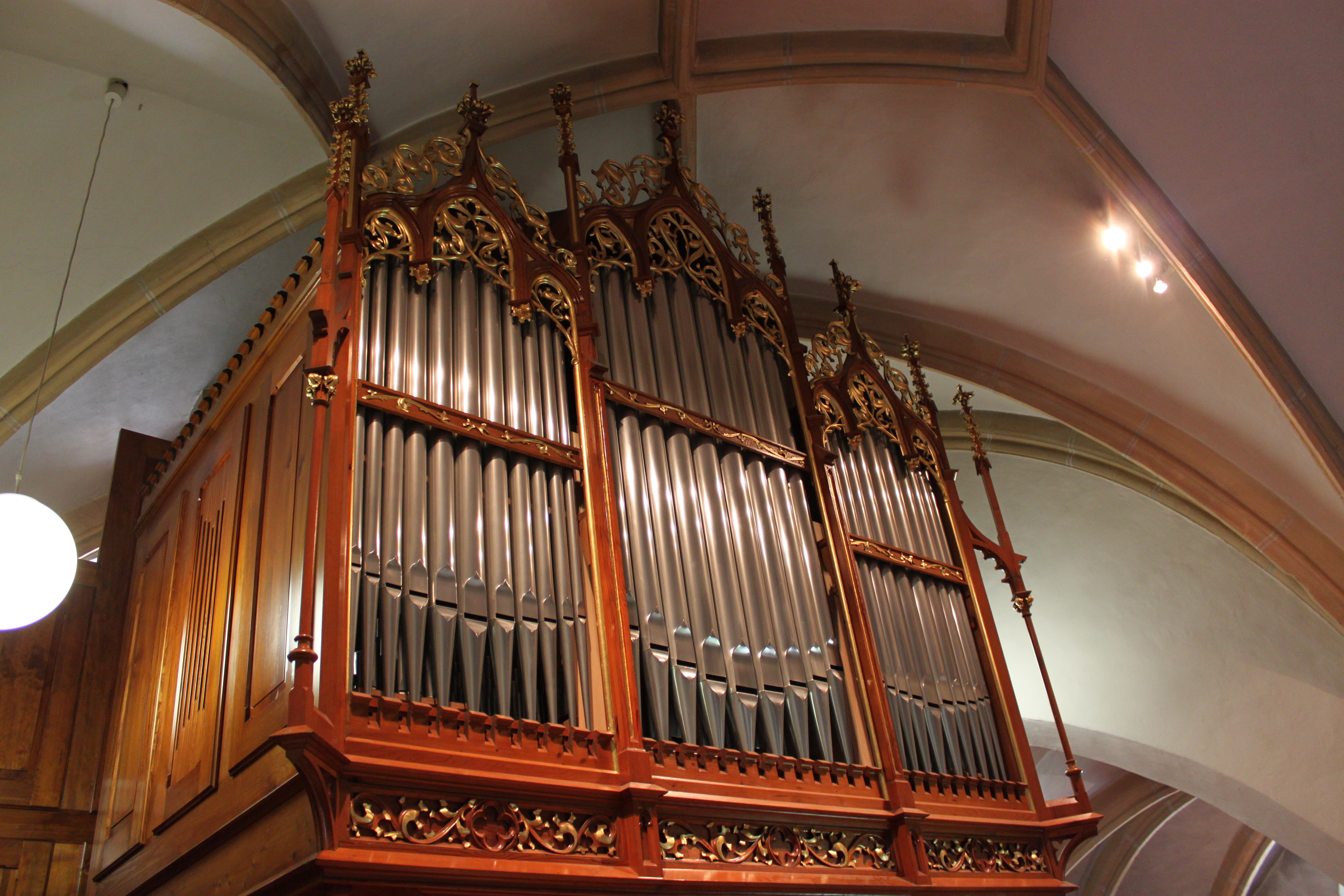 Orgel der Pfarrkirche St. Jakobus in Zeillern, Niederösterreich, errichtet 2003 durch Orgelbau Johann Pieringer